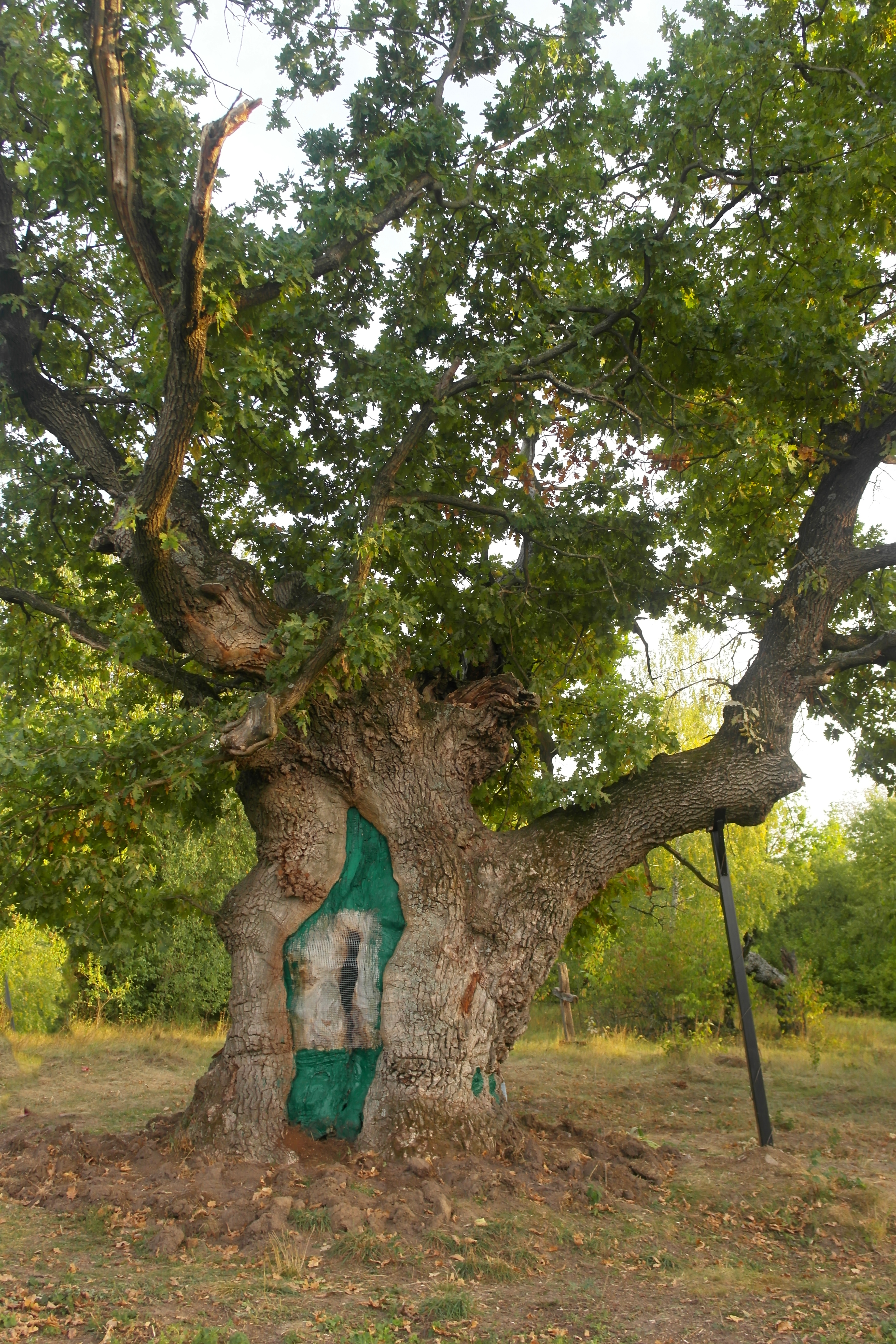 «Медвин дуб», Богуславський район, Медвинська сільська рада